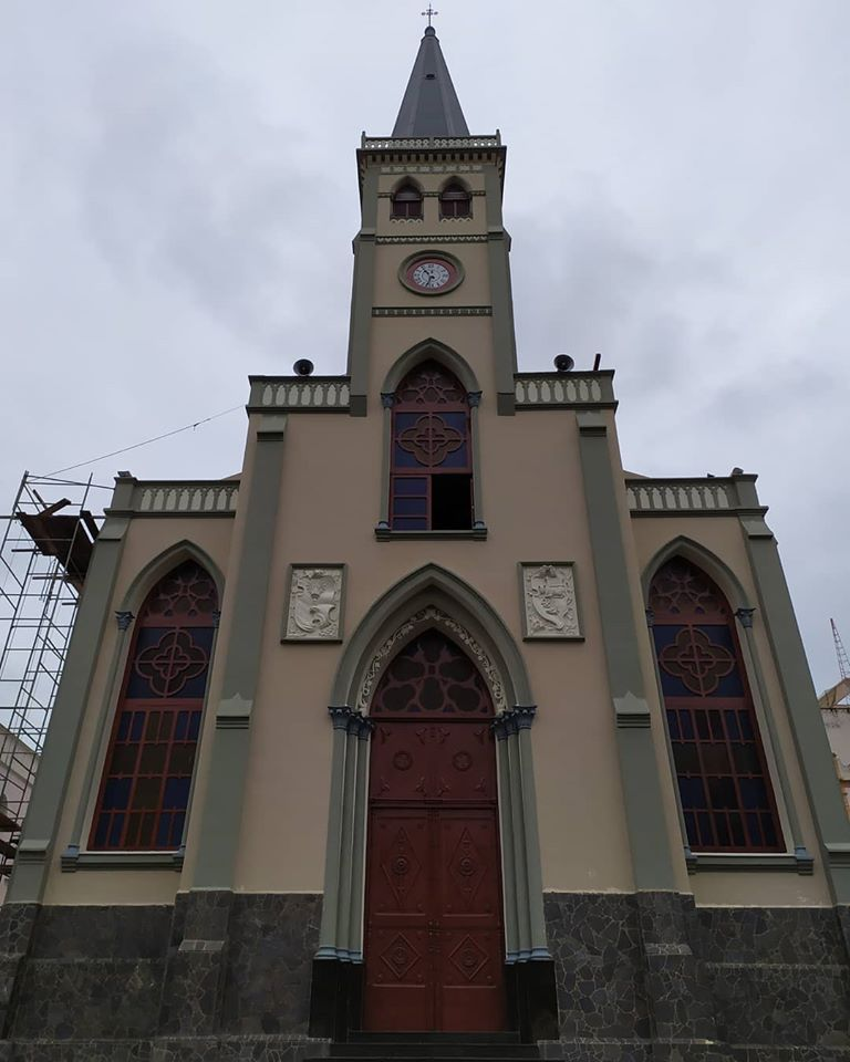 Paróquia São João Batista, no centro da cidade de Visconde do Rio Branco em Minas Gerais no Brasil. Pertence à Diocese de Leopoldina.